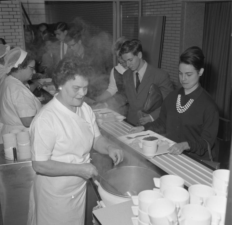 Universität Bonn, "Mensa"